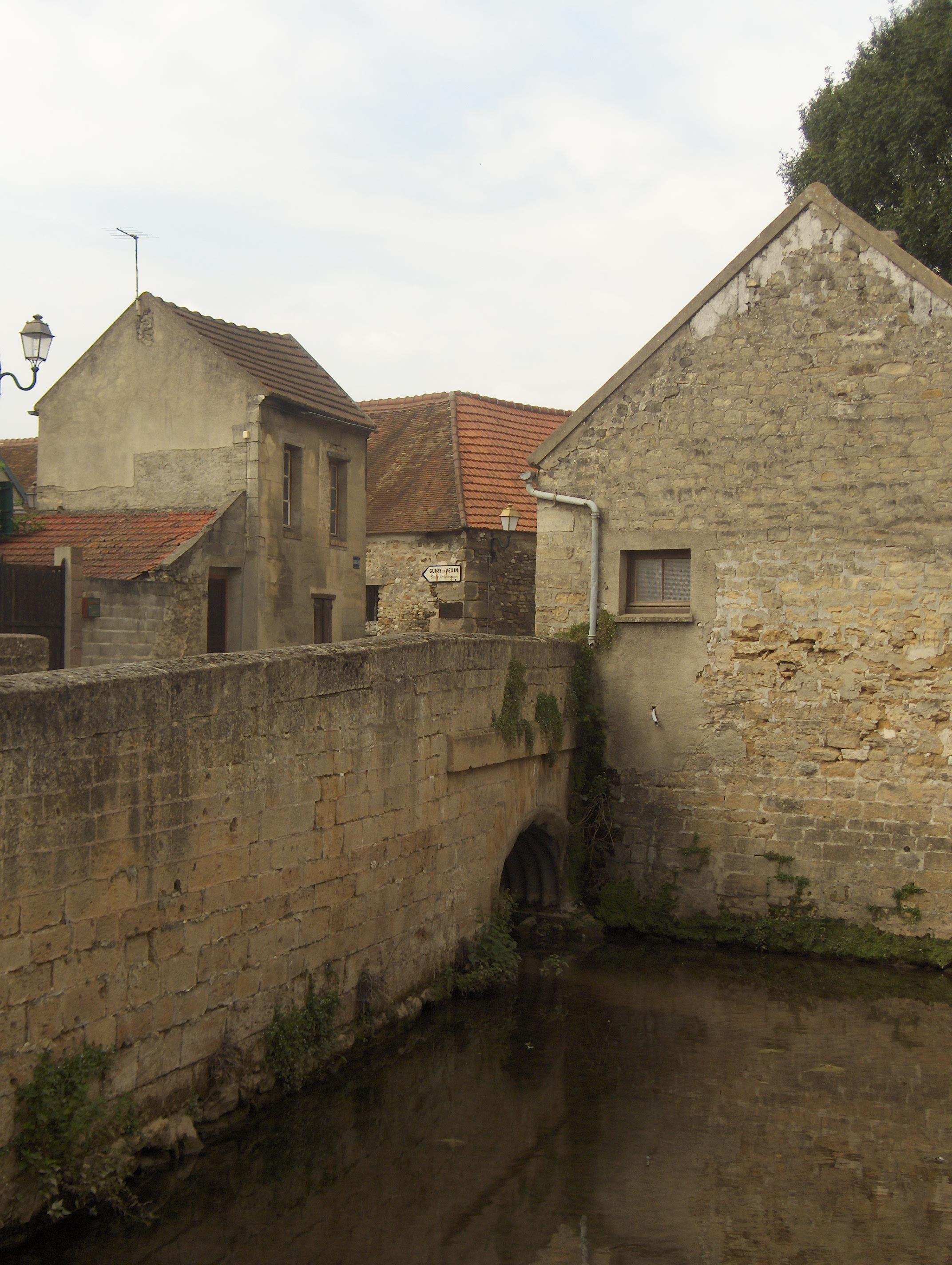 Vue du village d'Avernes (Vexin Français, Val-d'Oise) traversé par l'Aubette de Meulan